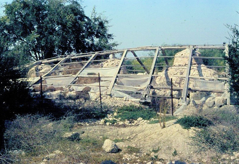 פארק קנדה - בית הקשתות